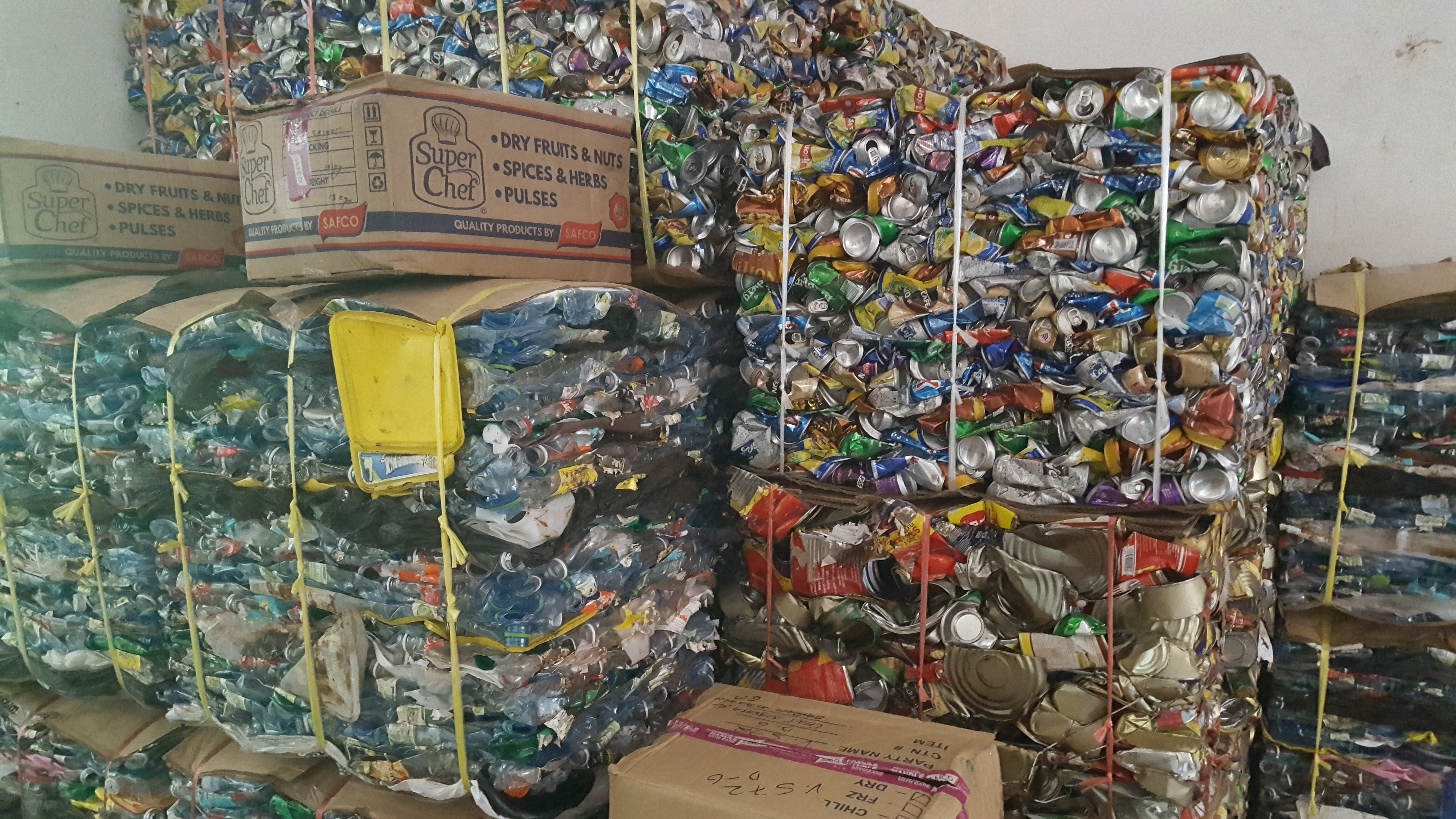 Sortierte und kompaktierte Wertstoffe (Metall, Kunststoff)